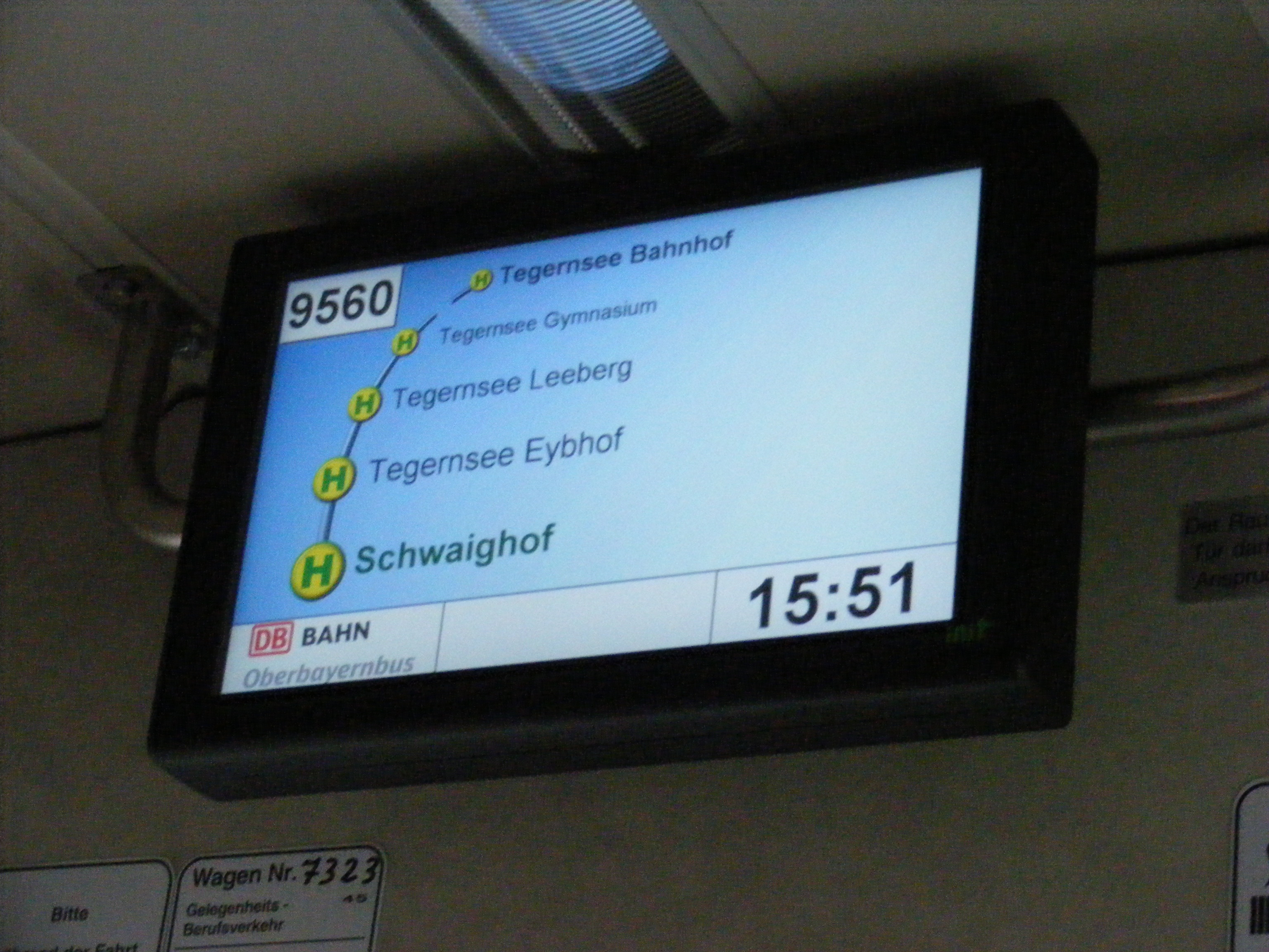 Fahrgastinformation im DB Oberbayernbus 9560 ("Schwaighof - Tegernsee Bahnhof" mit Anzeige der Zwischenhaltepunkte), Landkreis Miesbach, Bayern.